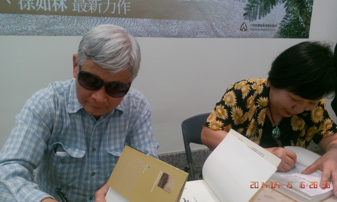 行政院農業委員會林務局 楊南郡、徐如林浸水營古道新書發表會簽名